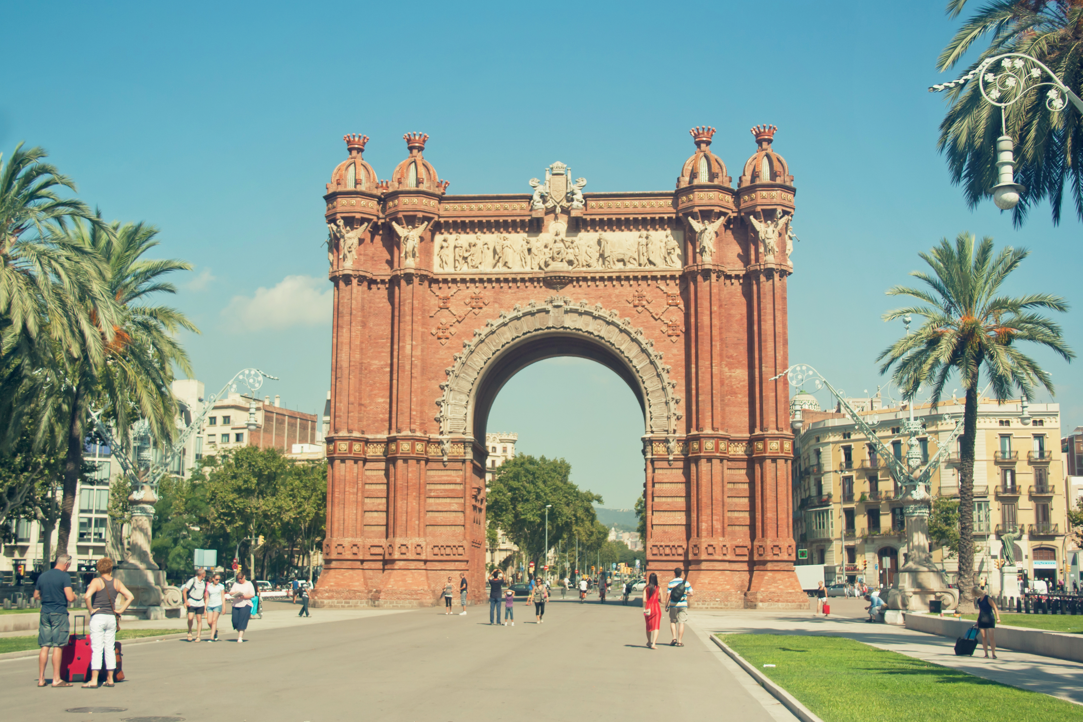 Barcelona, España